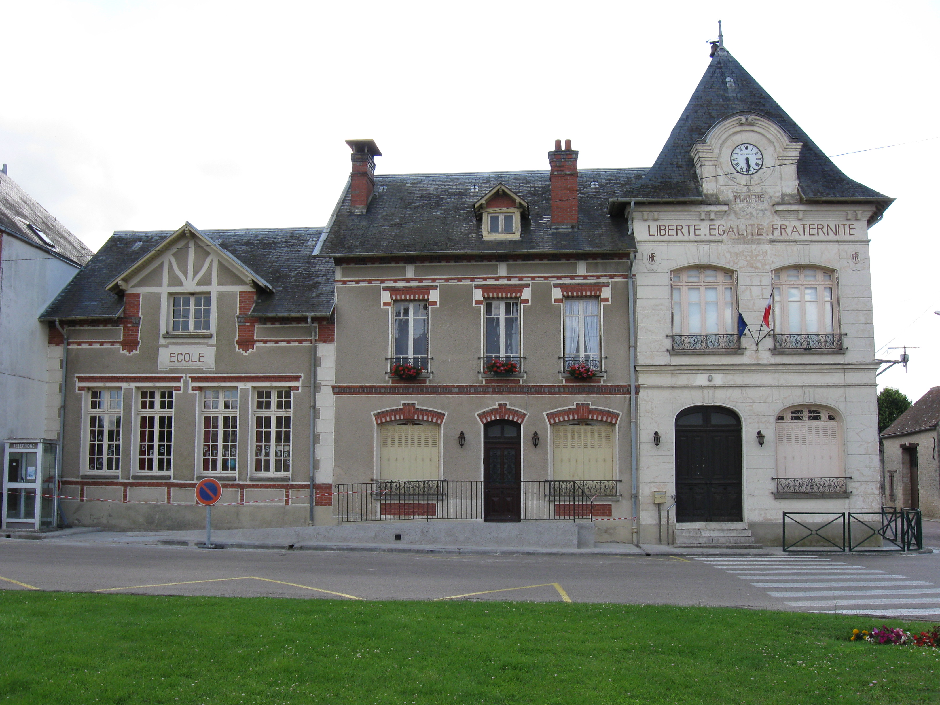 Mairie-école de Chevrainvilliers. (département de la Seine et Marne, région Île-de-France).